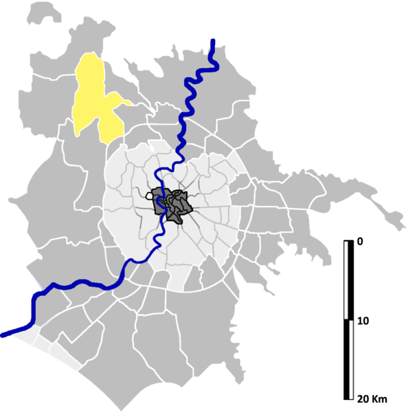 La Storta